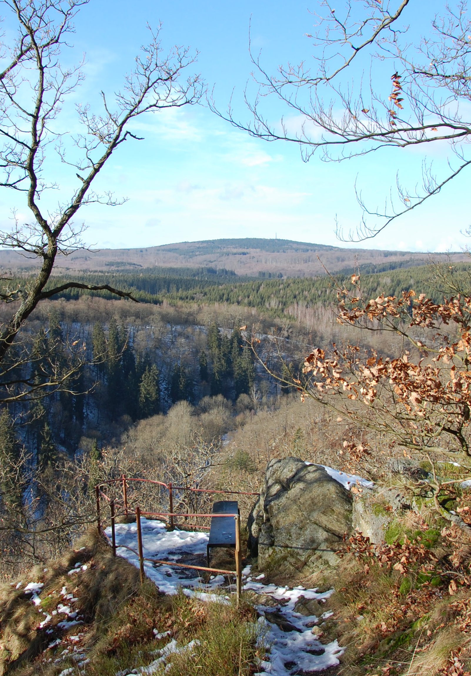 Freundschaftsklippe über dem Selketal